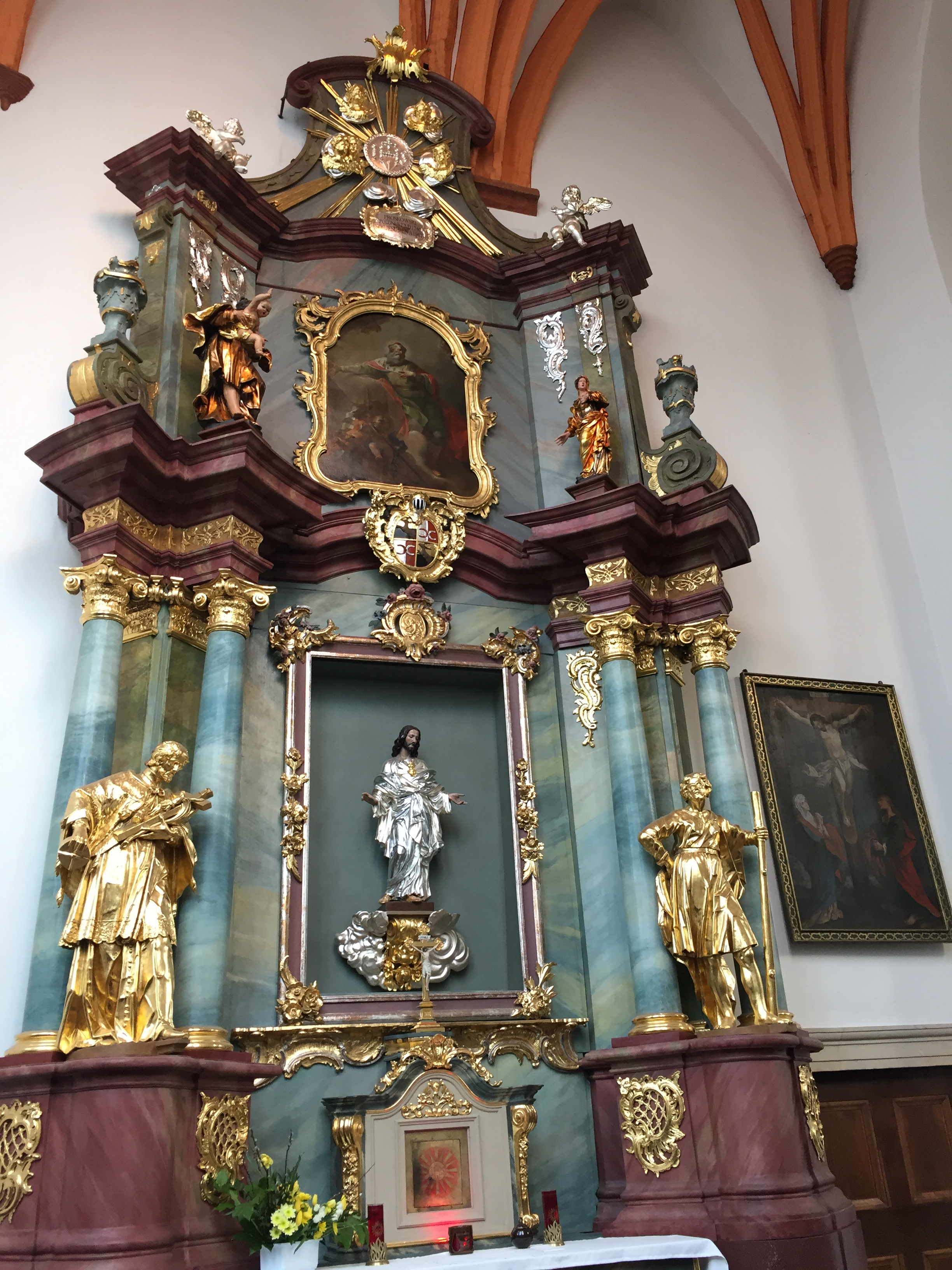 Ołtarz w nawie bocznej w kościele św. Macieja we Wrocławiu